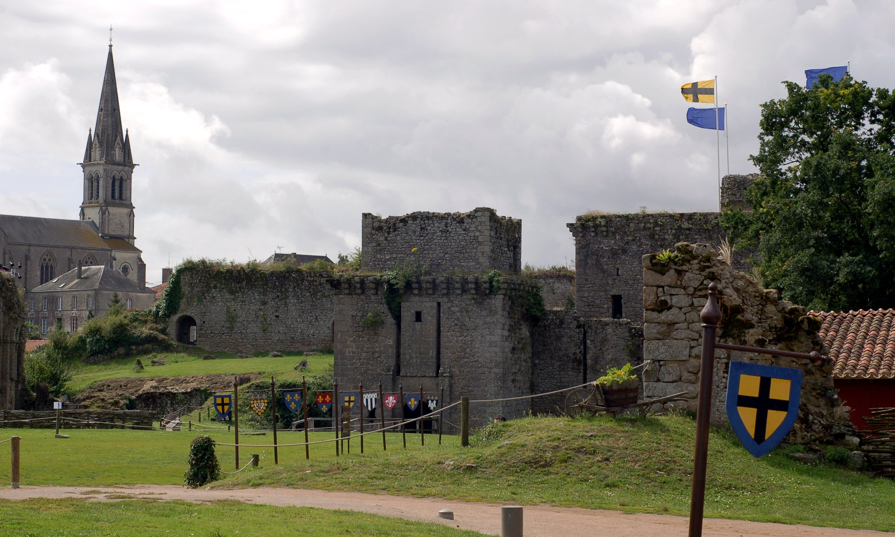 Die Burg Tiffauges in der Vendée